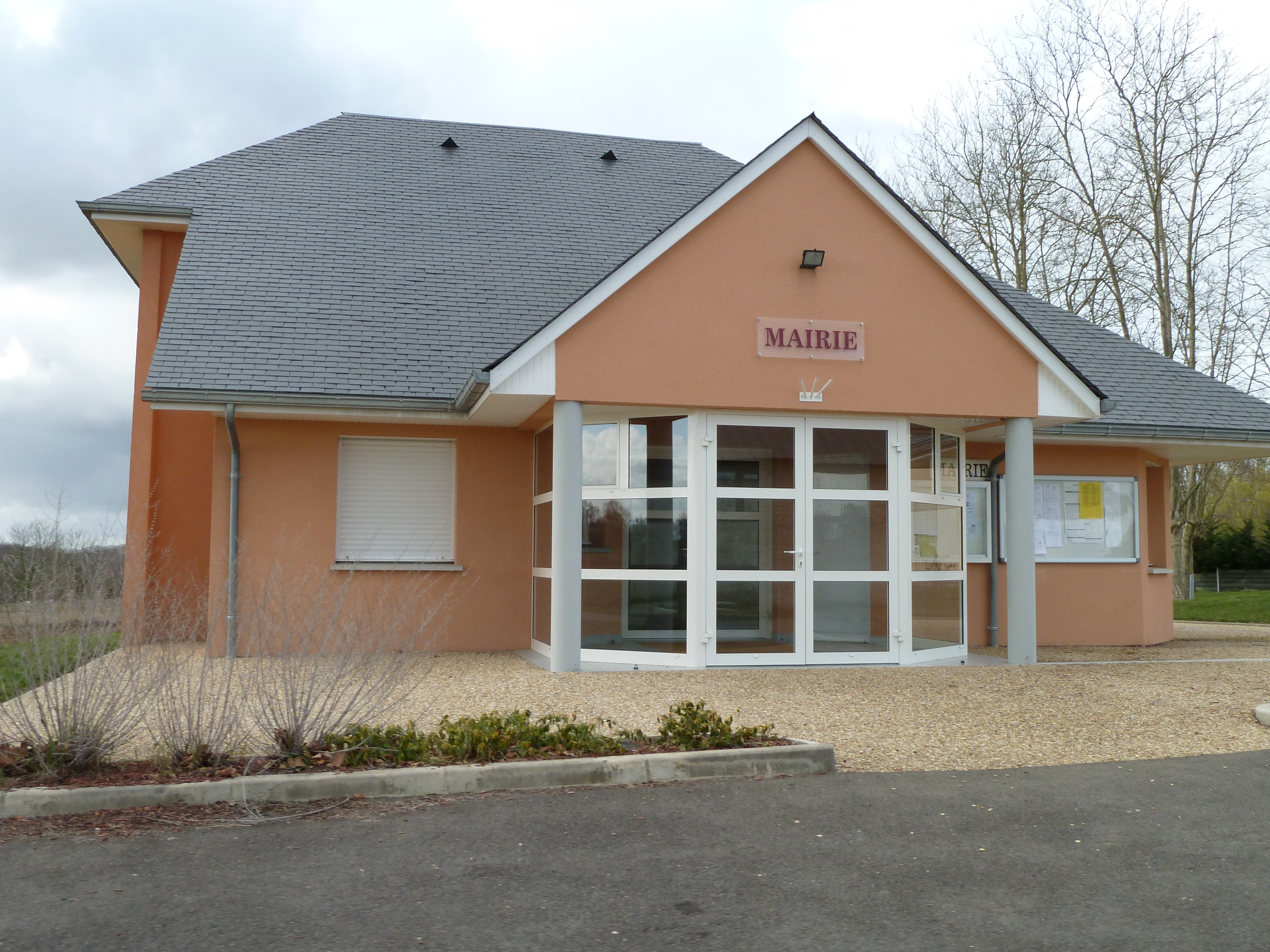 Mairie de Lamayou